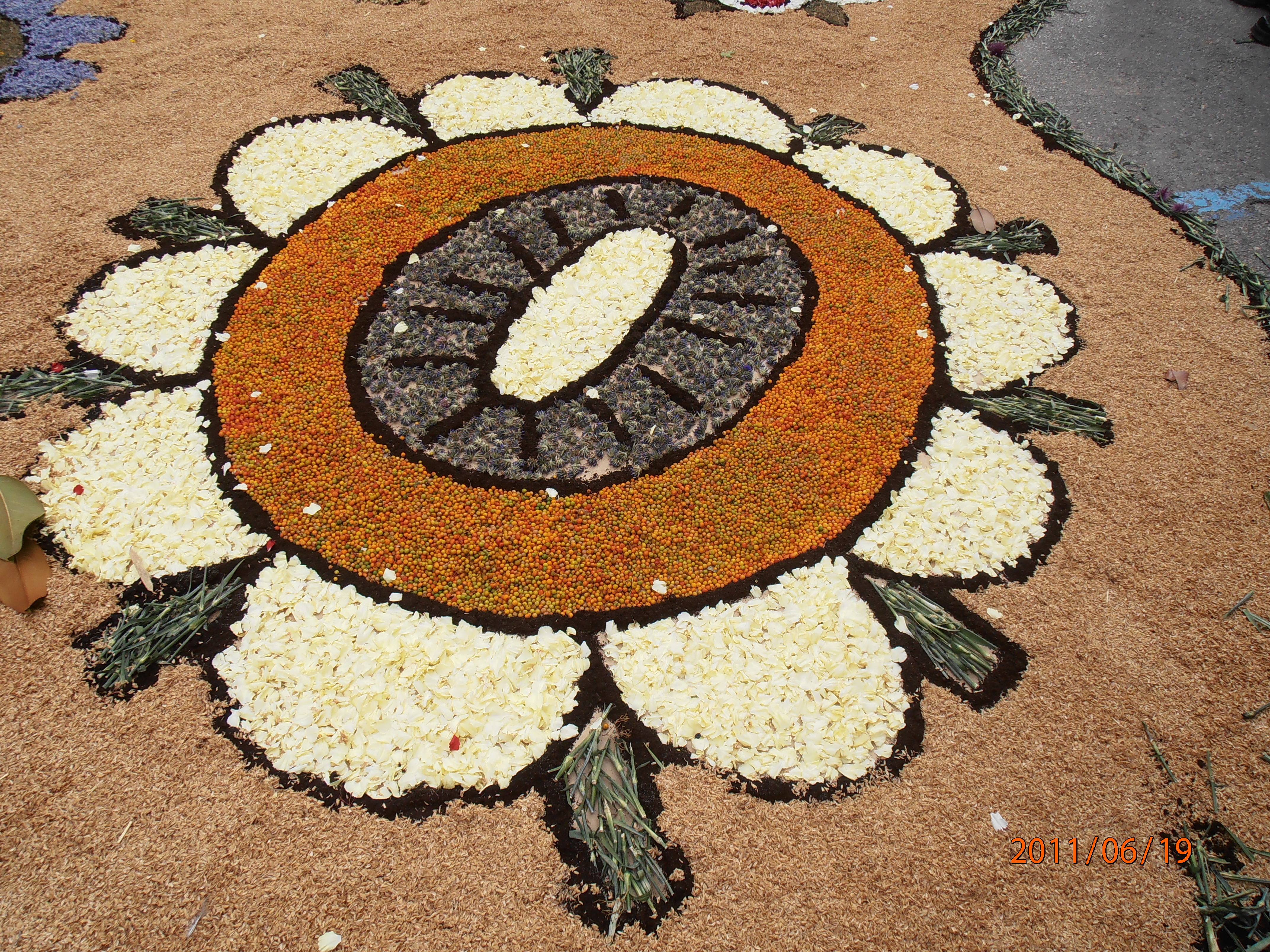 Detall d'una enramada d'Arbúcies